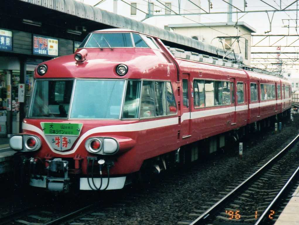 Nagoya Railroad EMU type 7000 "Panorama Car" At Higashi-Okazaki Sta.